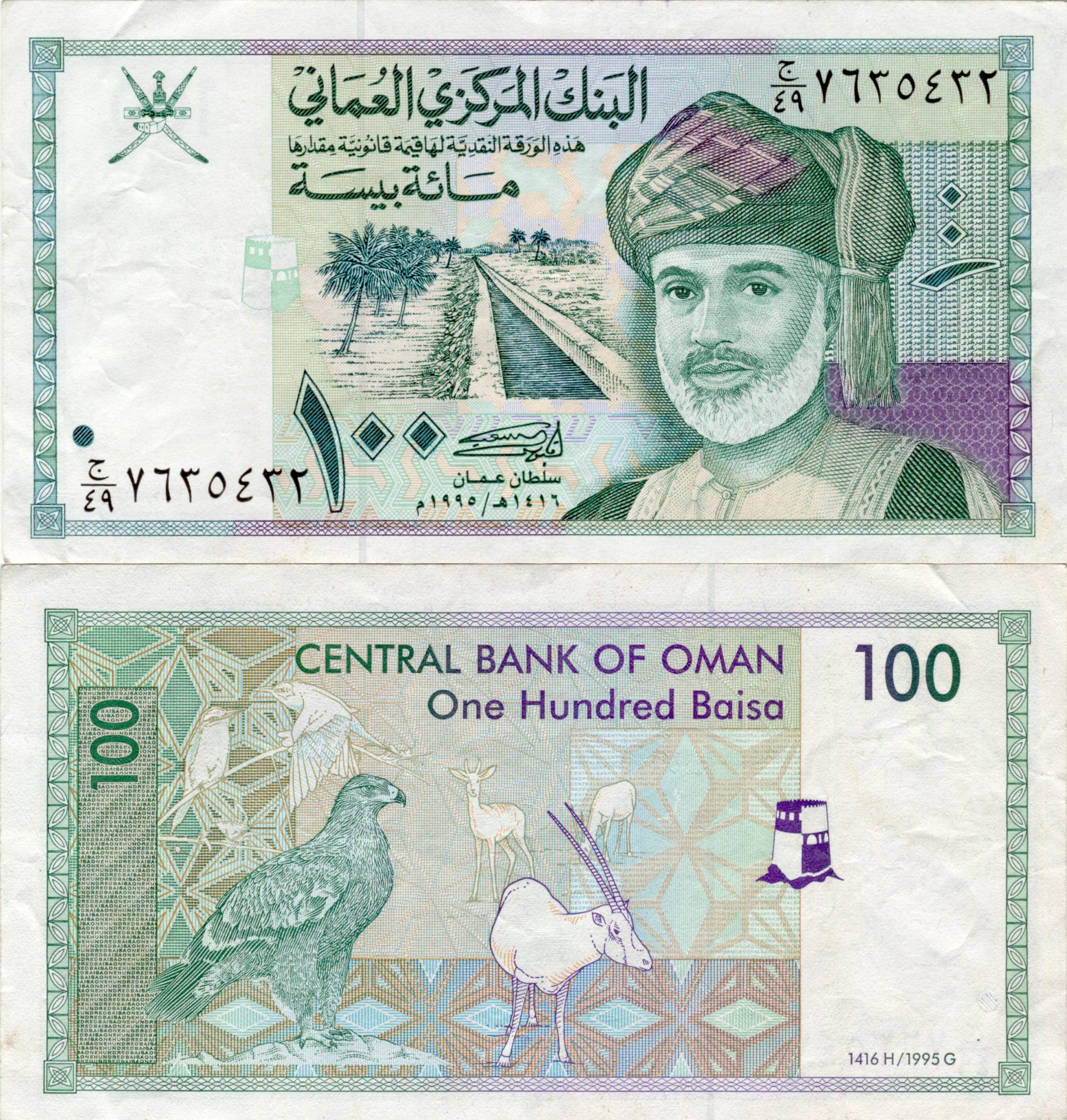 OMR 0,100 obverse + reverse